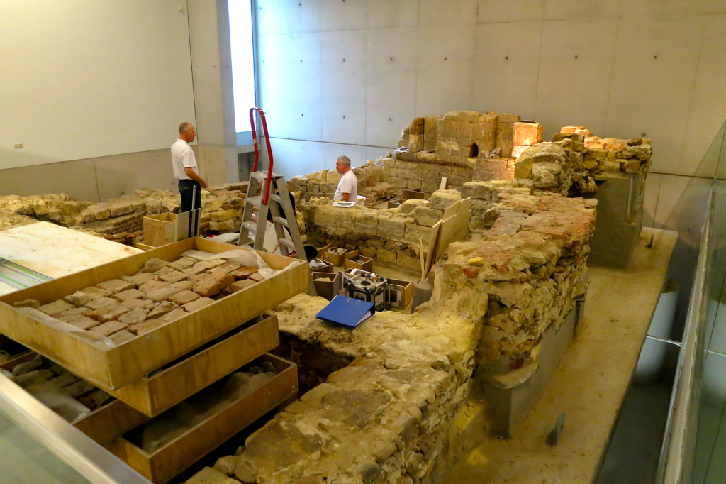 Het Mikwe van Venlo is in 2004 bij opgravingen bij de Maasboulevard ontdekt. Het Mikwe is een bad waarin Joden zich tijdens belangrijke momenten in hun leven ritueel reinigen door onderdompeling in levend water. Het is het oudste monument van Nederland dat daadwerkelijk met een Joodse gemeenschap kan worden verbonden. Rond 1350 is het Mikwe in onbruik geraakt. In die tijd waarde de pest rond in Europa en kregen de Joden de schuld ervan in de schoenen geschoven. Ze werden verjaagd en rond 1350 werd het badhuis verbouwd tot opslagruimte. De fundamenten zijn onlangs naar het museum getransporteerd en worden hier gerestaureerd. Bron: museum